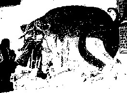 Bigorne, bichromie, fresque du Chateau de Villeneuve Lembron